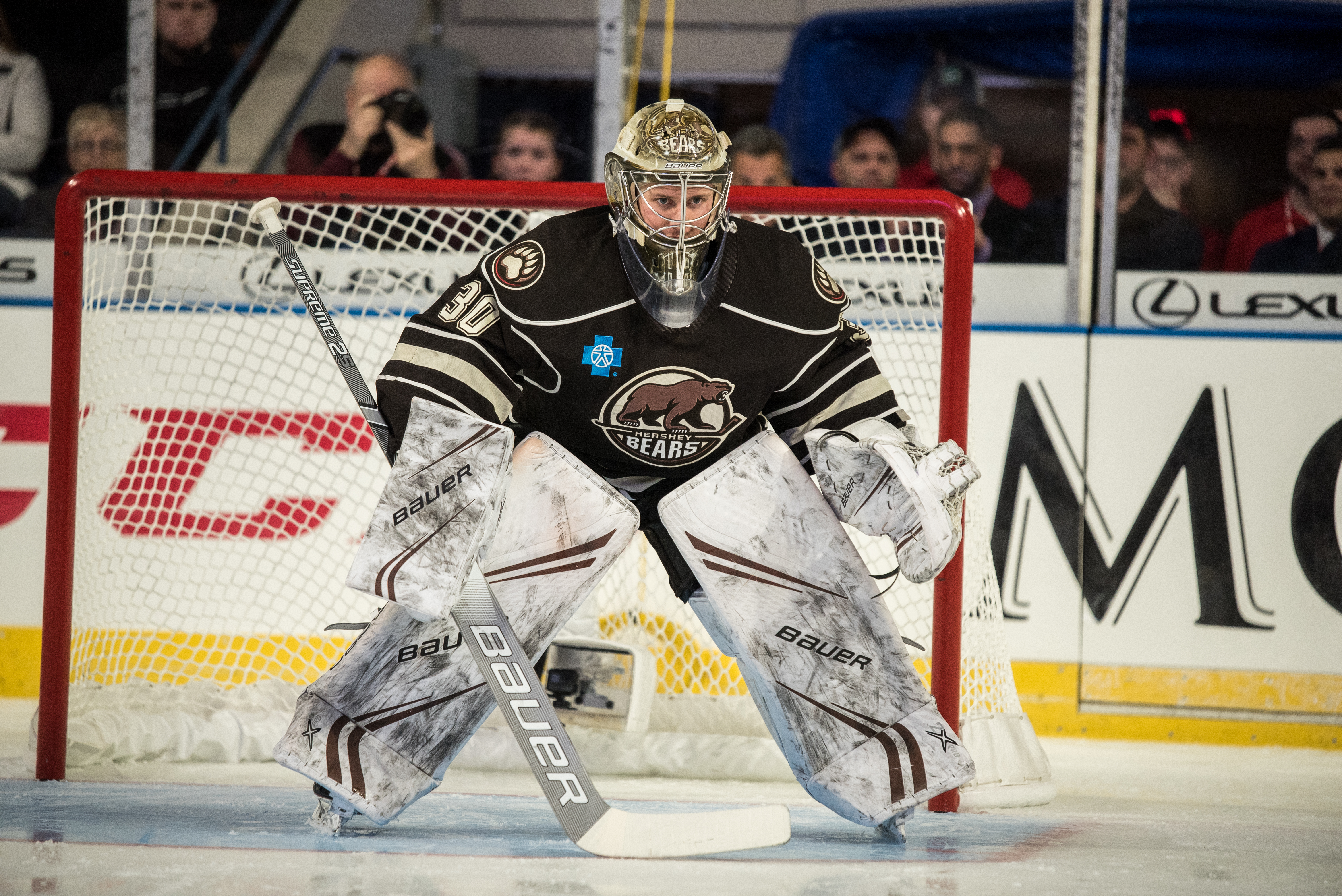 CYW_1444